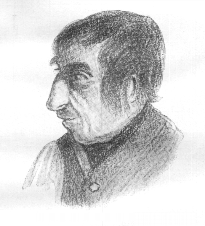 Originalbildunterschrift: Kito Pank in seiner letzten Lebenszeit.